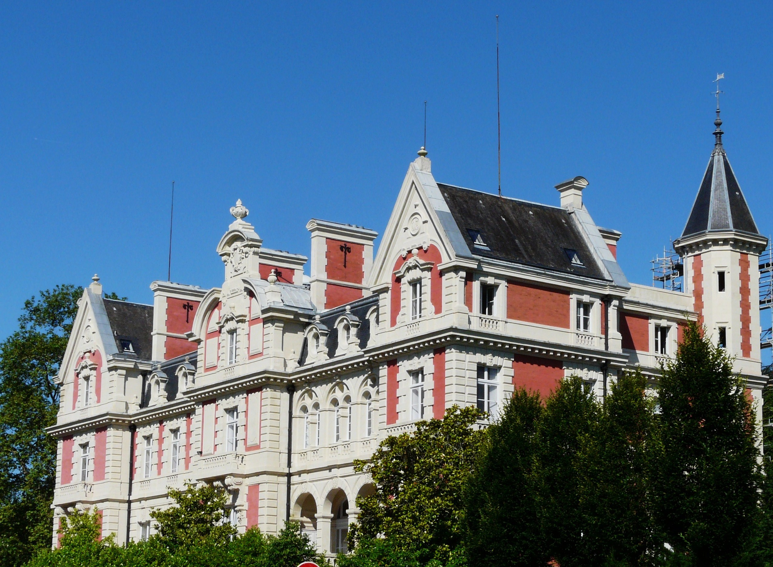 L'angle oriental du château Magne (ou château de Trélissac) à Trélissac, Dordogne, France. Object location45° 11′ 31.4″ N, 0° 46′ 28.2″ E